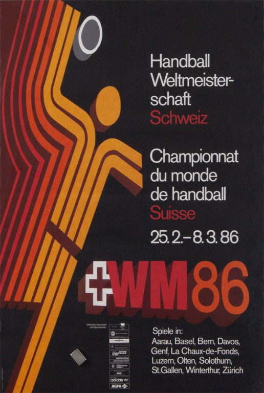 Plakar der Handball-Weltmeisterschaft der Männer 1986